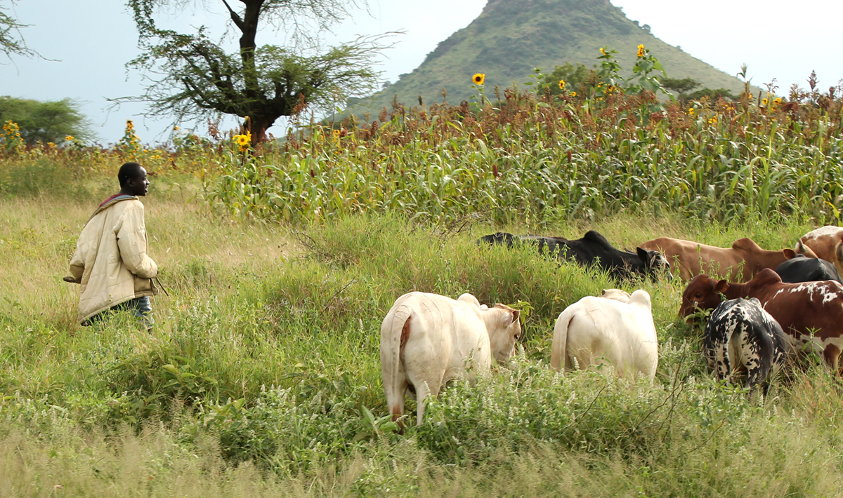 Des efforts sont en cours au Tchad pour réduire les tensions entre éleveurs et agriculteurs. La légende "VOA" en bas, à droite, confirme que c'est un oeuvre de la VOA.